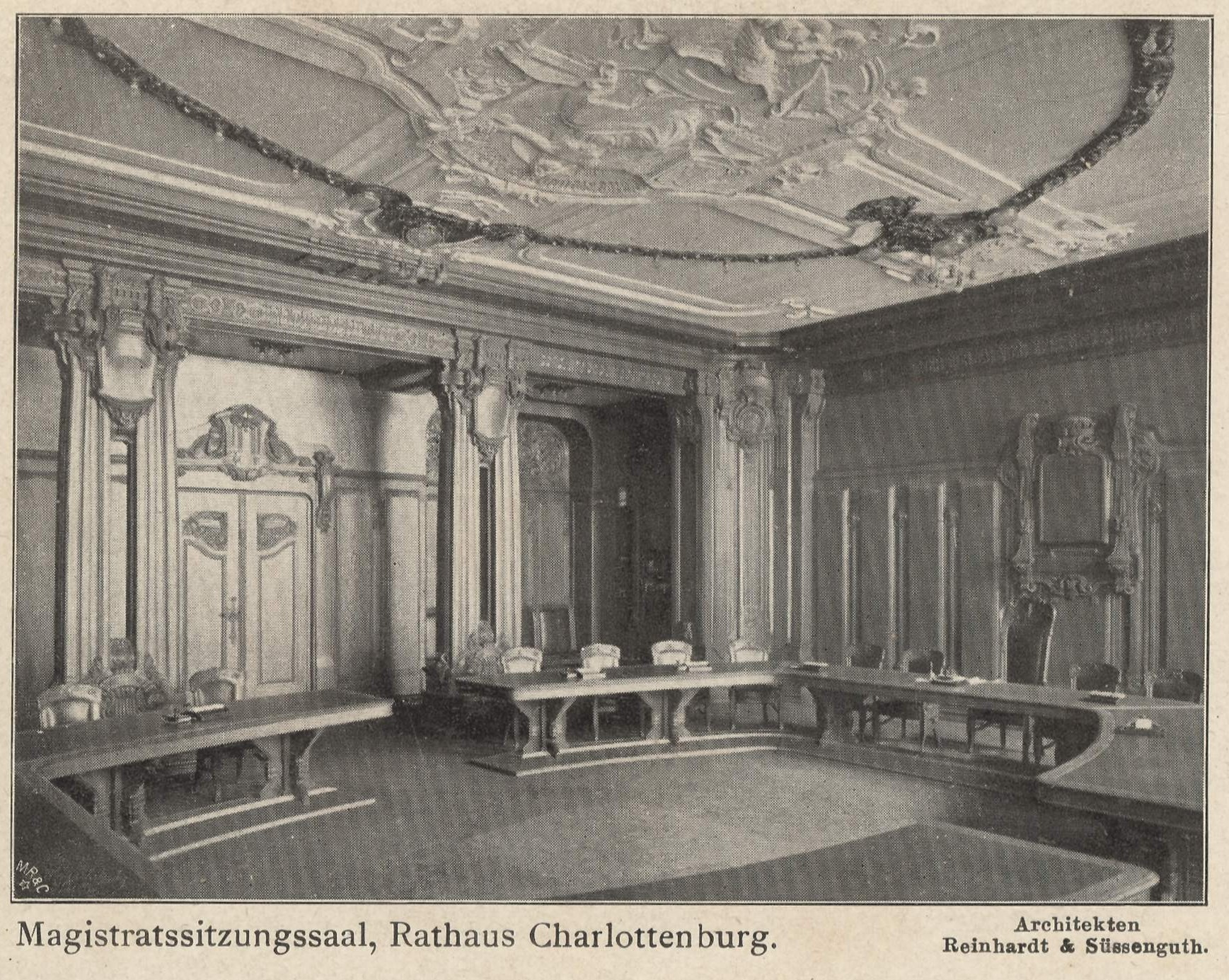 Magistrats-Sitzungssaal, eingeweiht 1905, Foto von 1904. Dieser Saal ist in der ursprünglichen Größe und Vertäfelung bis heute erhalten geblieben. Ursprünglich wurde die Geschossebene als 1. Obergeschoss bezeichnet und ist heutzutage das 2. OG. Die elektrische Beleuchtung ist in dem Bronzeguss-Ring an der Decke integriert. Im Stockwerk darüber war der größer geschnittene Stadtabgeordneten-Sitzungssaal. Im Stockwerk darunter war ursprünglich die Sparkasse geplant. Der Magistratssaal wurde 1955 umbenannt in Pommernsaal und wird seit 2009 Minna-Cauer-Saal genannt.